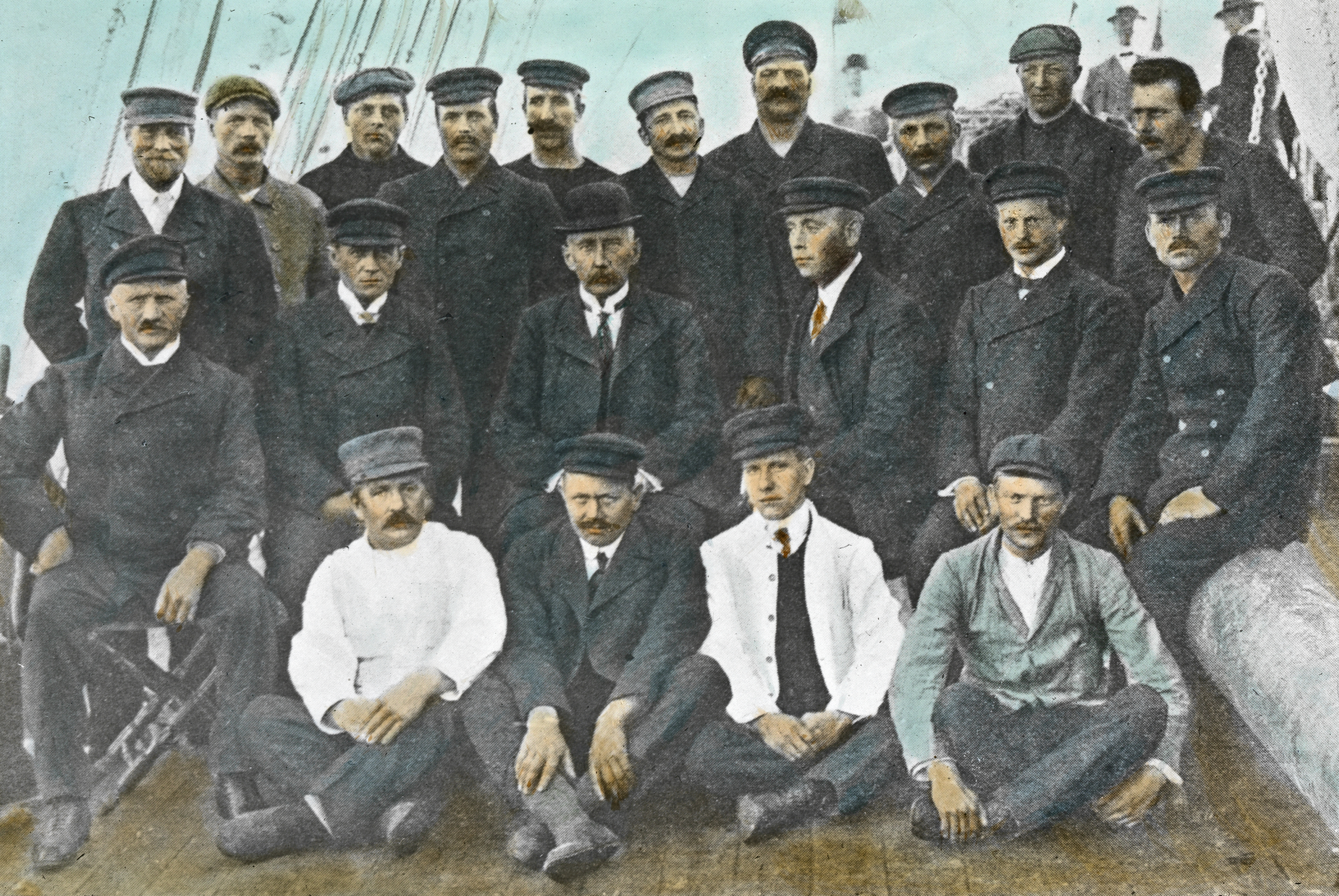 Beskrivelse / Description: Bakerst fra venstre står altmuligmann Sverre Hassel, islos Ludvig Hansen, F. Steller, altmuligmann Olav Bjaaland, tredje maskinist Halvardus Kristensen, seilmaker Martin Rønne, islos Andreas Beck, altmuligmann Oscar Wisting, H. Halvorsen, maskinist Knut Sundbeck, og sittende: altmuligmann Hjalmar Johansen, Kristian Prestrud, ekspedisjonsleder Roald Amundsen, nestkommanderende og kaptein Thorvald Nilsen, andre styrmann Hjalmar Gjertsen, altmuligmann Helmer Hanssen, kokk Adolf Lindstrøm, snekker Jørgen Stubberud, kokk Karenius Olsen og A. Olsen. Dato / Date: 7. mars 1912 Sted / Place: Australia, Tasmania, Hobart Fotograf / Photographer: ukjent / unknown Digital kopi av original / Digital copy of original: glasspositiv, kolorert, avfotografering av rastrert repro Eier / Owner Institution: Nasjonalbiblioteket / National Library of Norway Lenke / Link: Bildesignatur / Image Number: bldsa_NPRA0094